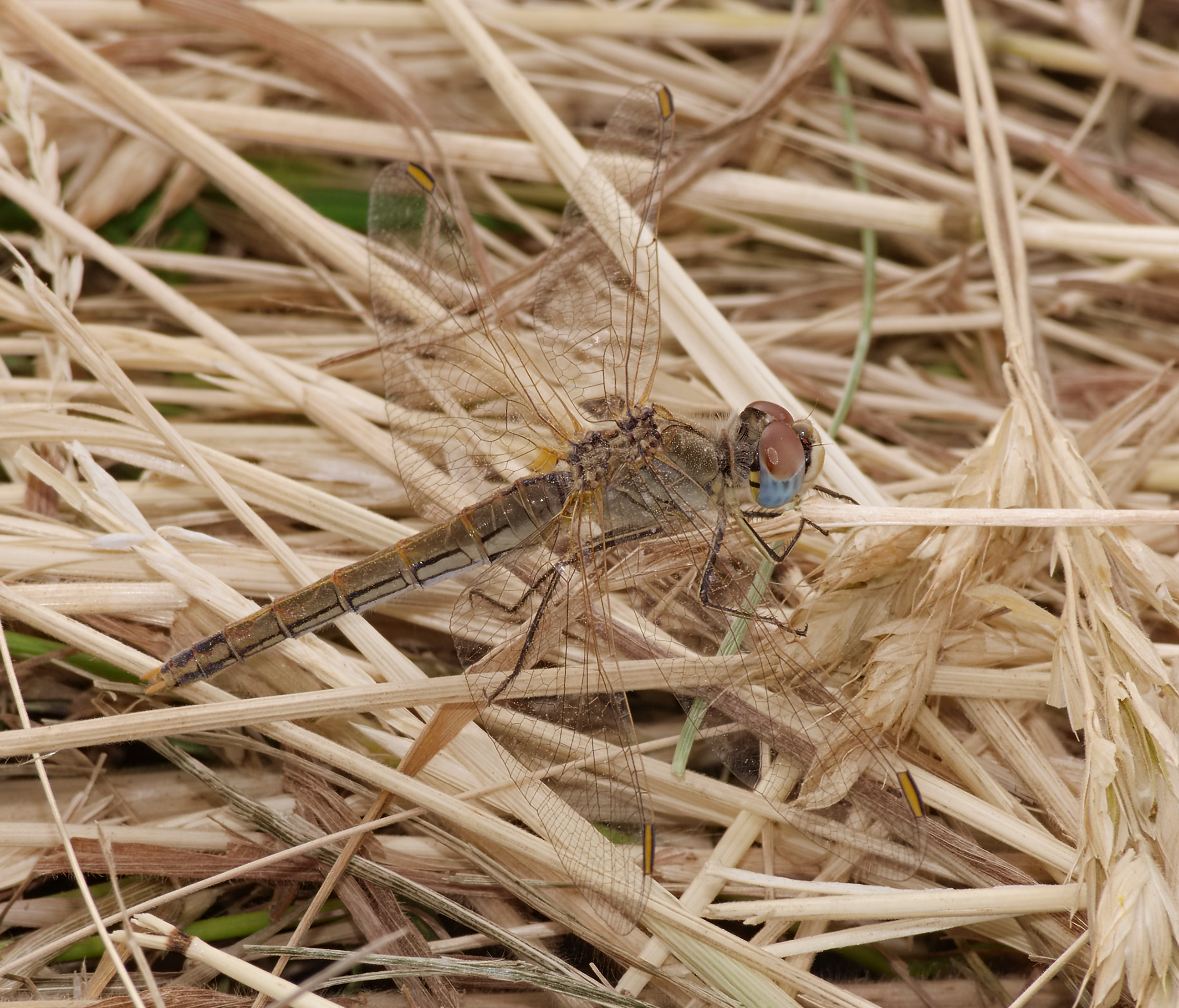 Frühe Heidelibelle - Sympetrum fonscolombii, Weibchen. Aufgenommen in Buchklingen (Odenwald), Hessen, Deutschland.